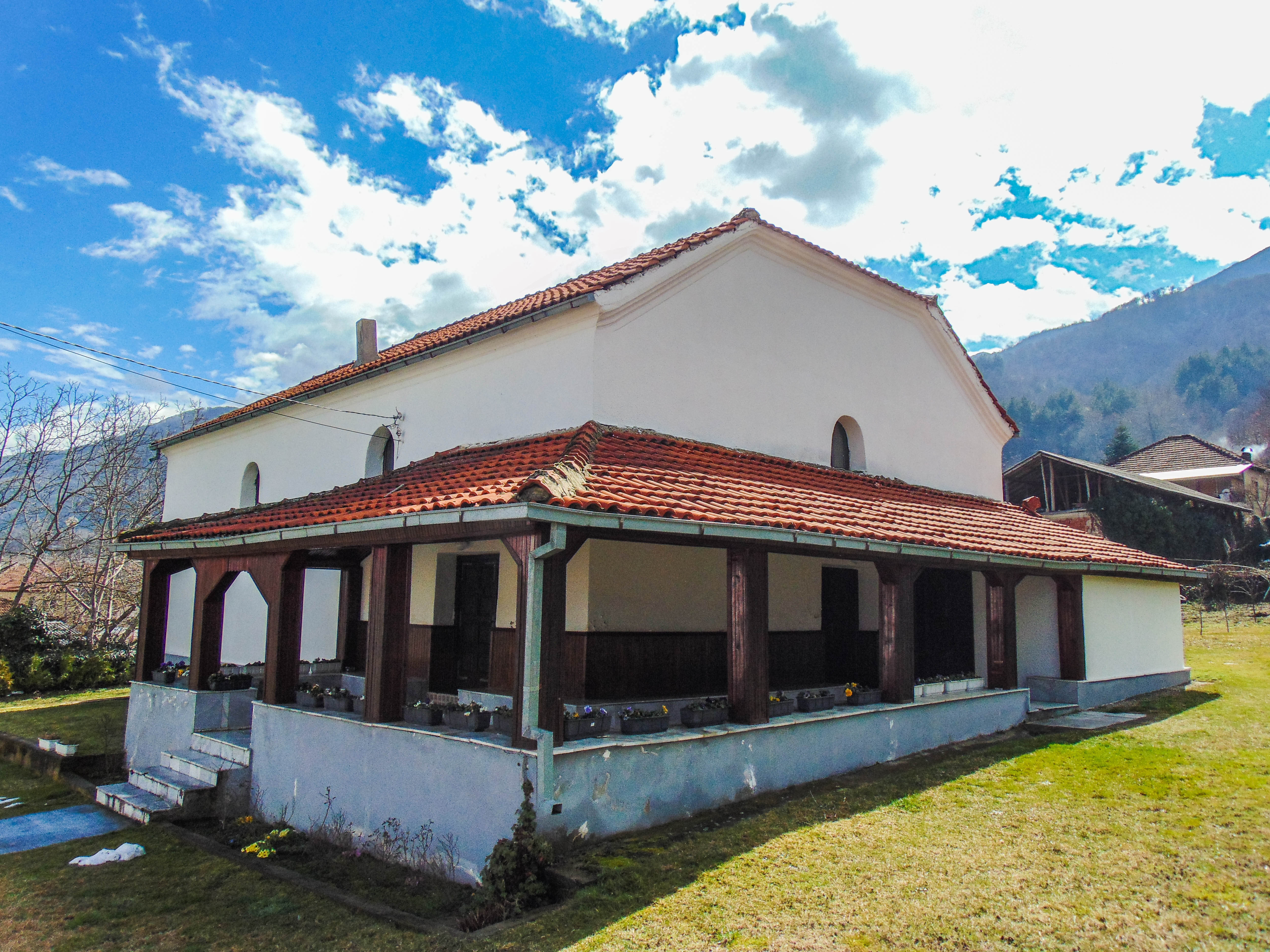 Црква „Св. Спас“ - Колешино